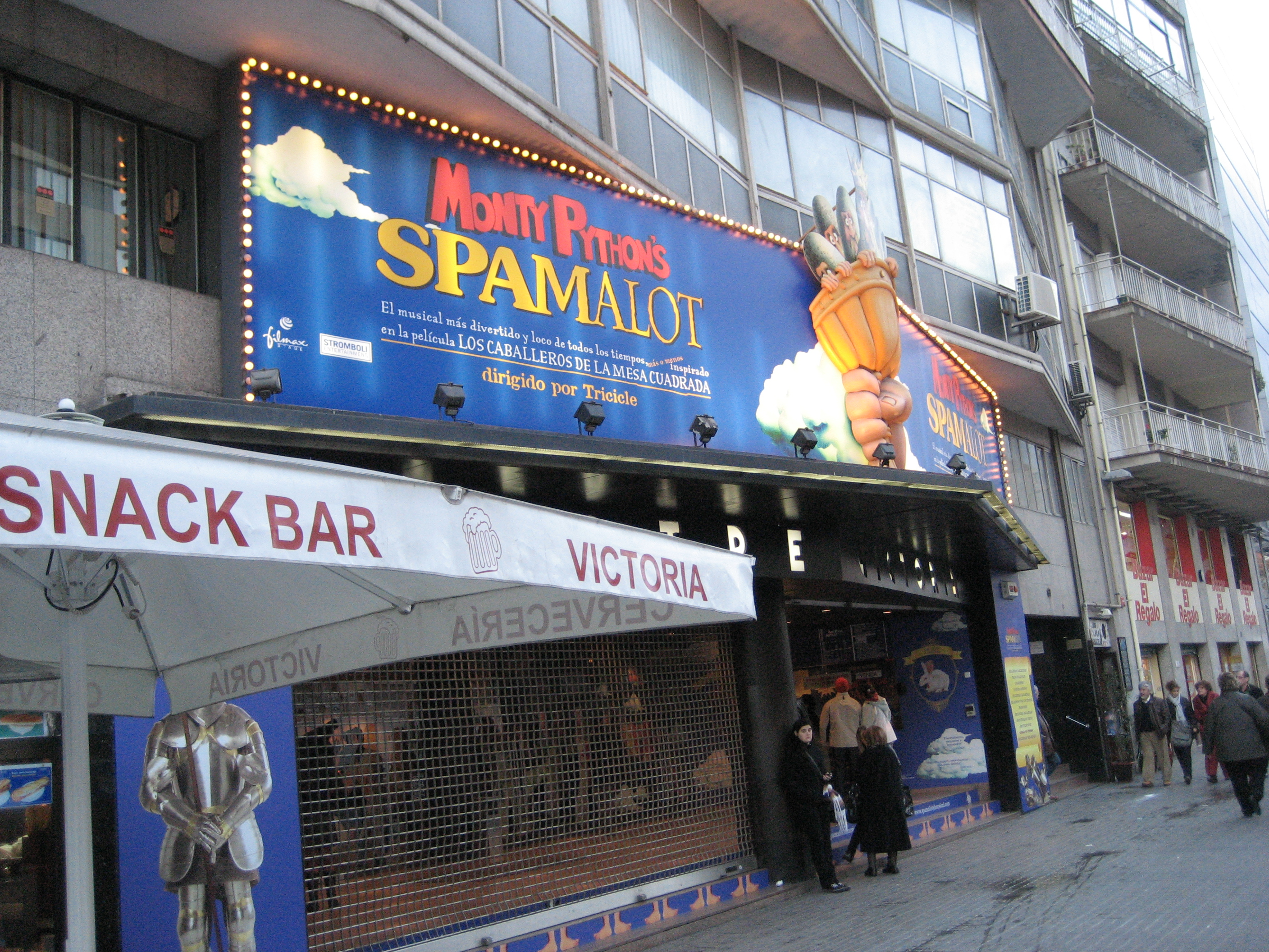 Teatre Victòria de Barcelona_gener 2009